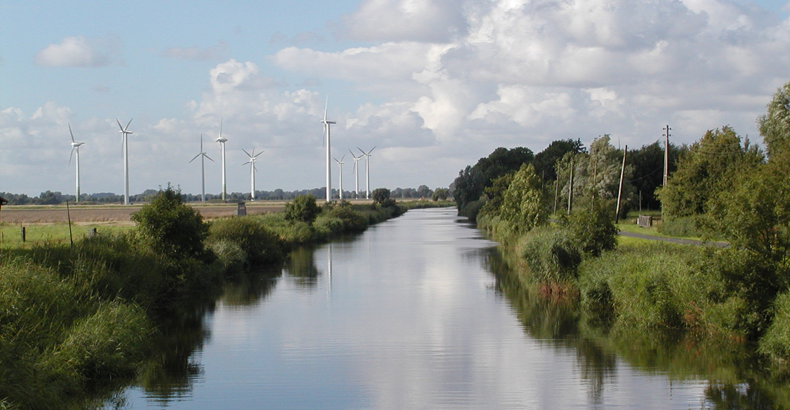 Der Hadelner Kanal bei Bülkau Richtung Nord